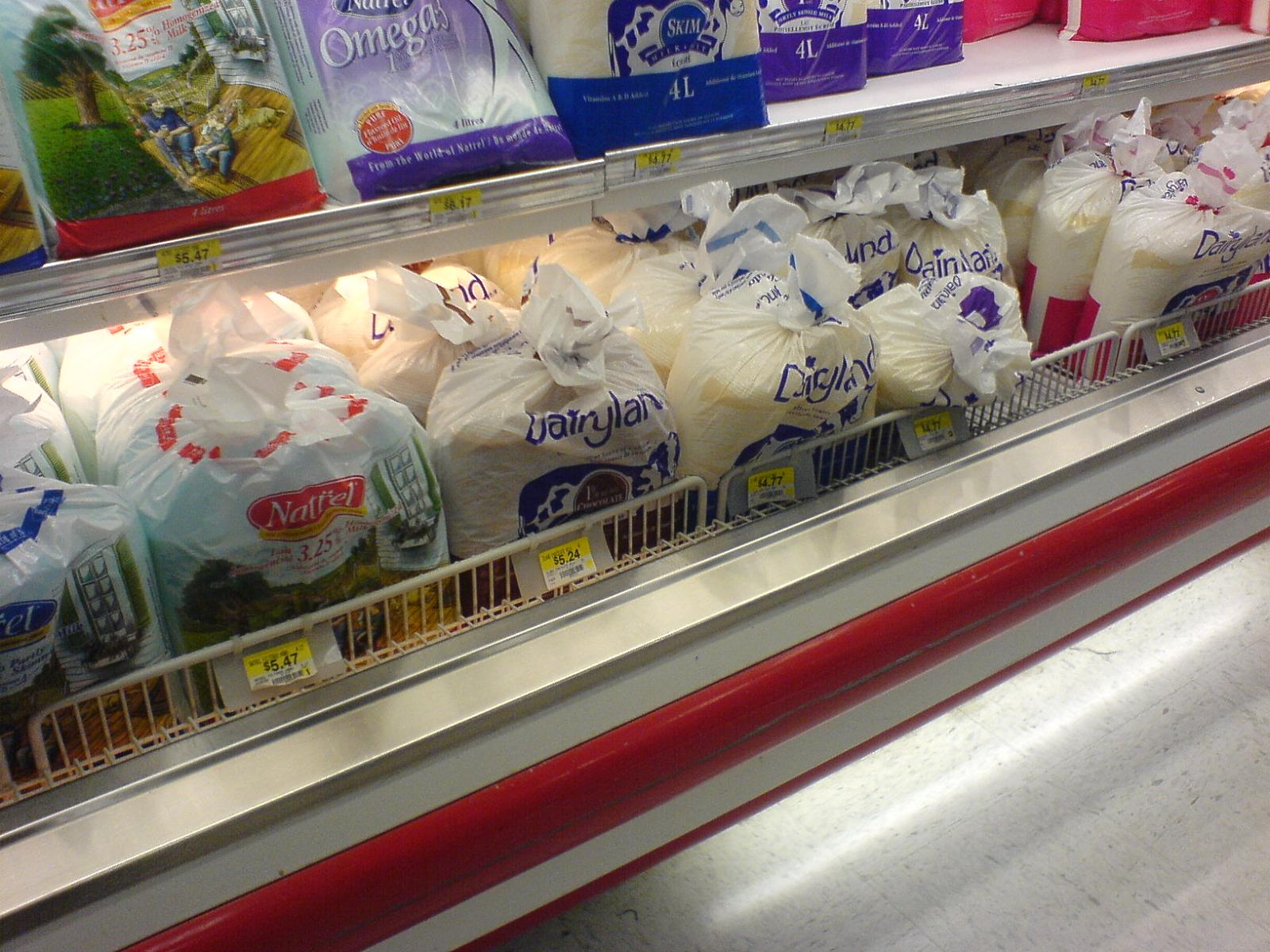 Milk bags!